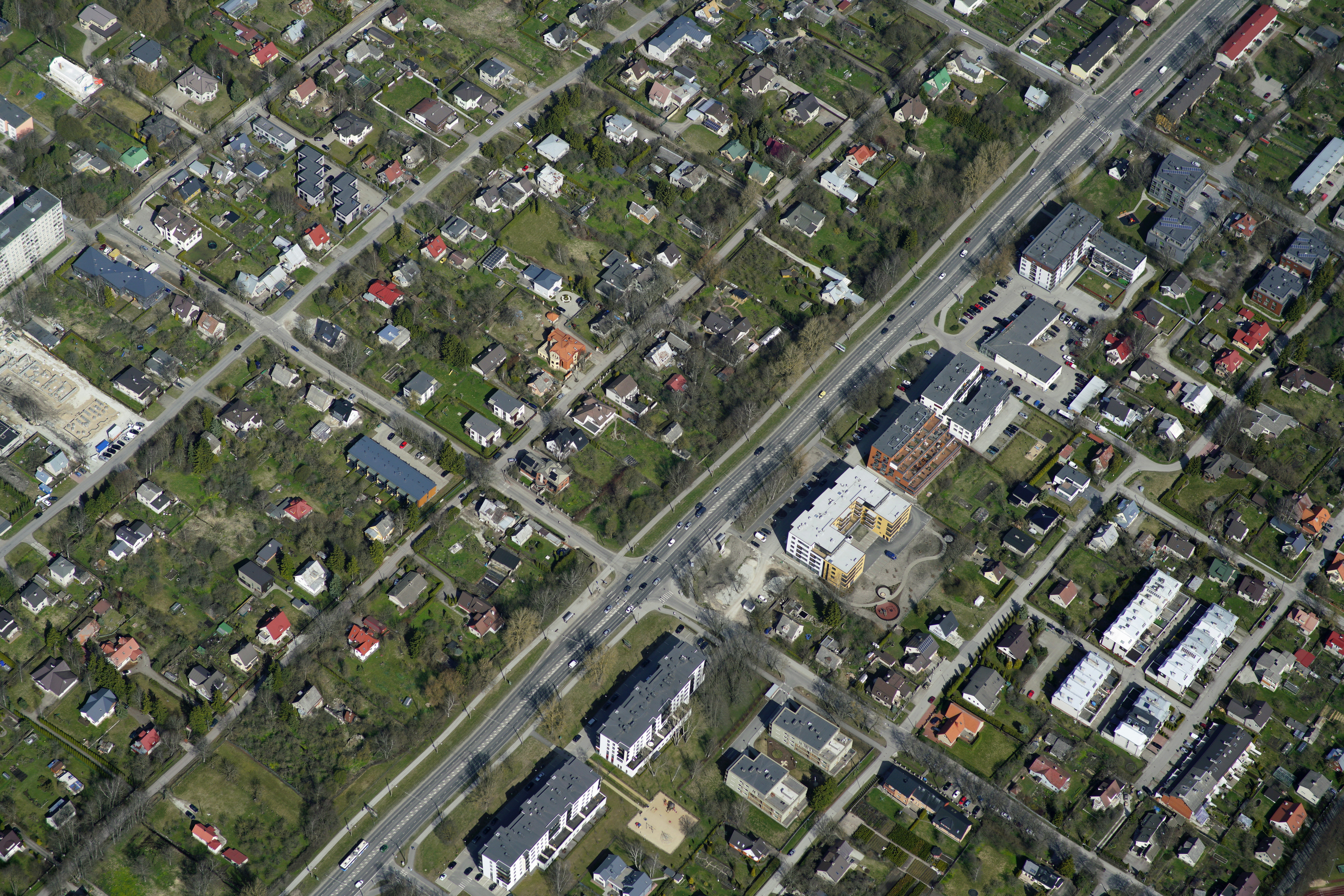 Õhuvaade Lilleküla asumile